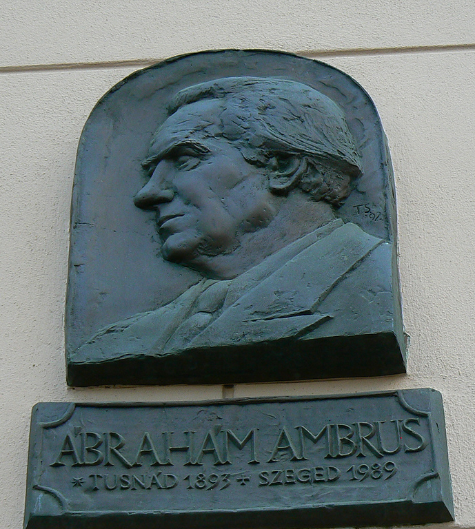 Tóth Sándor bronz portréja Ábrahám Ambrusról